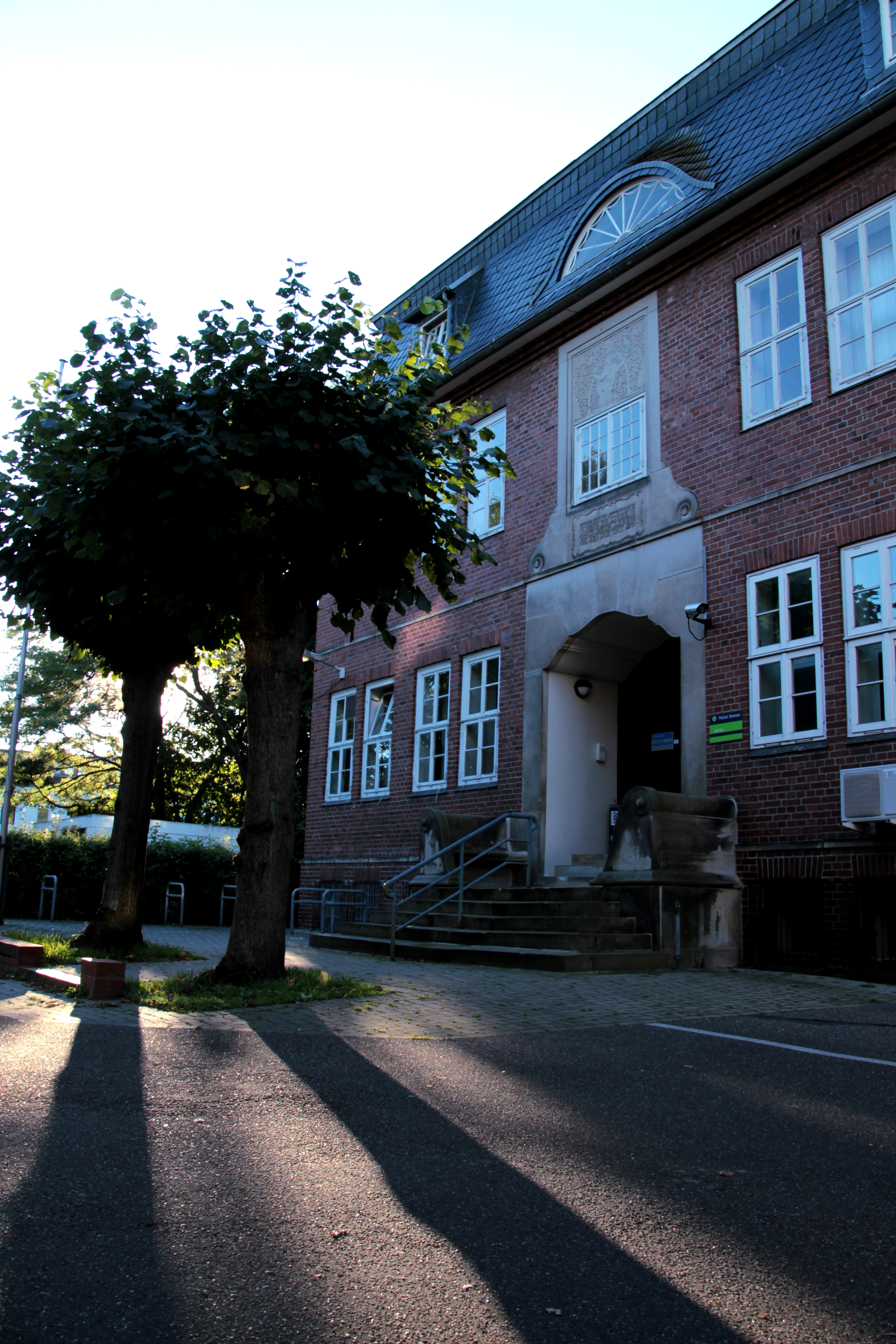 Lyzeum Schomburg, Schule, Lyzeum, heute Polizeiwache, Baujahr: 1912–1914, Architekt: Hermann Basselmann, Adresse: Hoyaer Straße 11, Brommyplatz, Östliche Vorstadt, Bremen